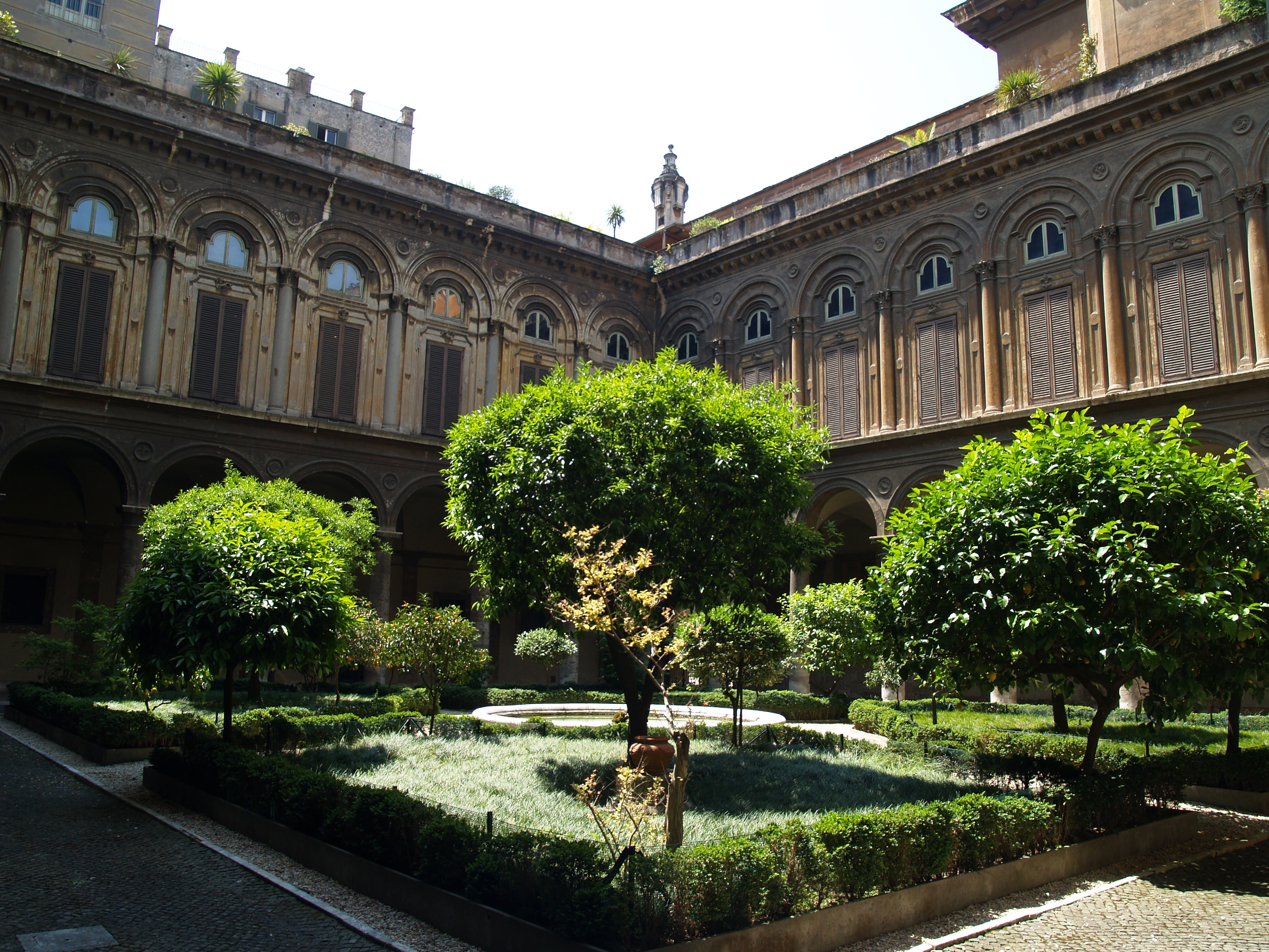 Roma, Palazzo Doria Pamphili, patio.